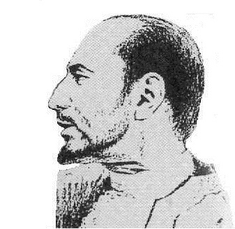 Juan de Valdés (1505-1541)